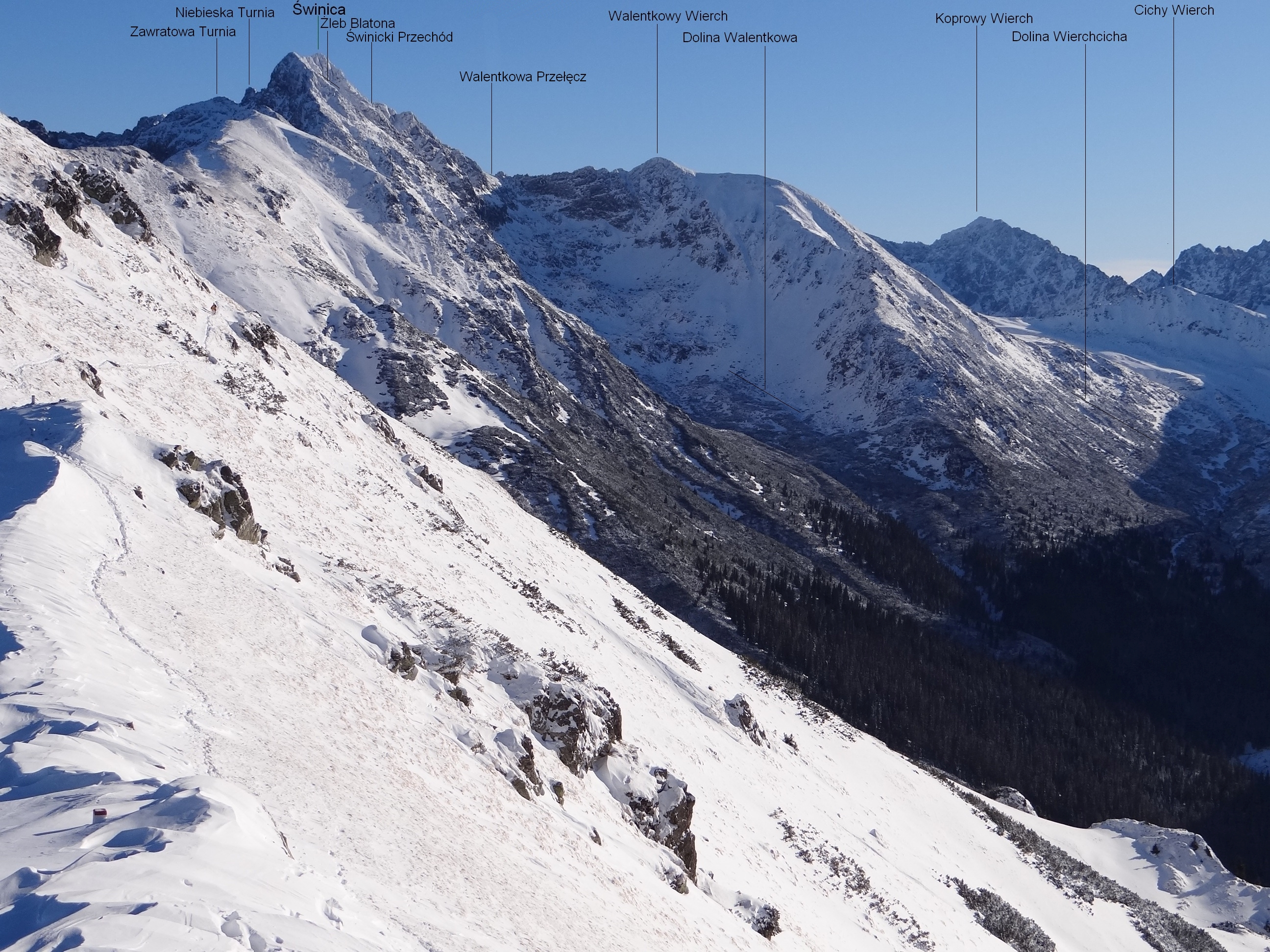 Widok z grani Kasprowy Wierch - Kopa Małołącka